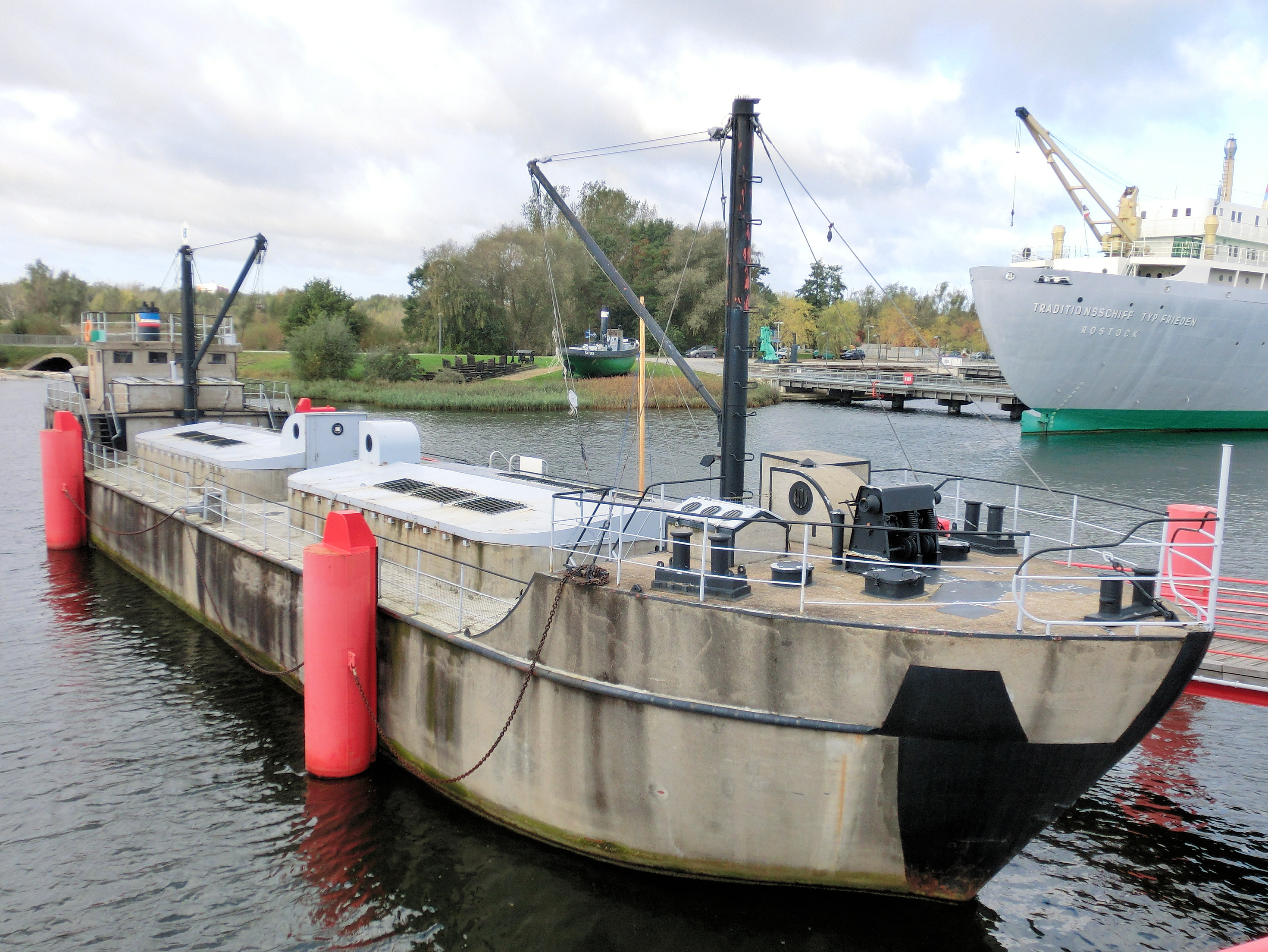 Rostock Schifffahrtsmuseum Betonschiff "Capella" (Baudenkmal)